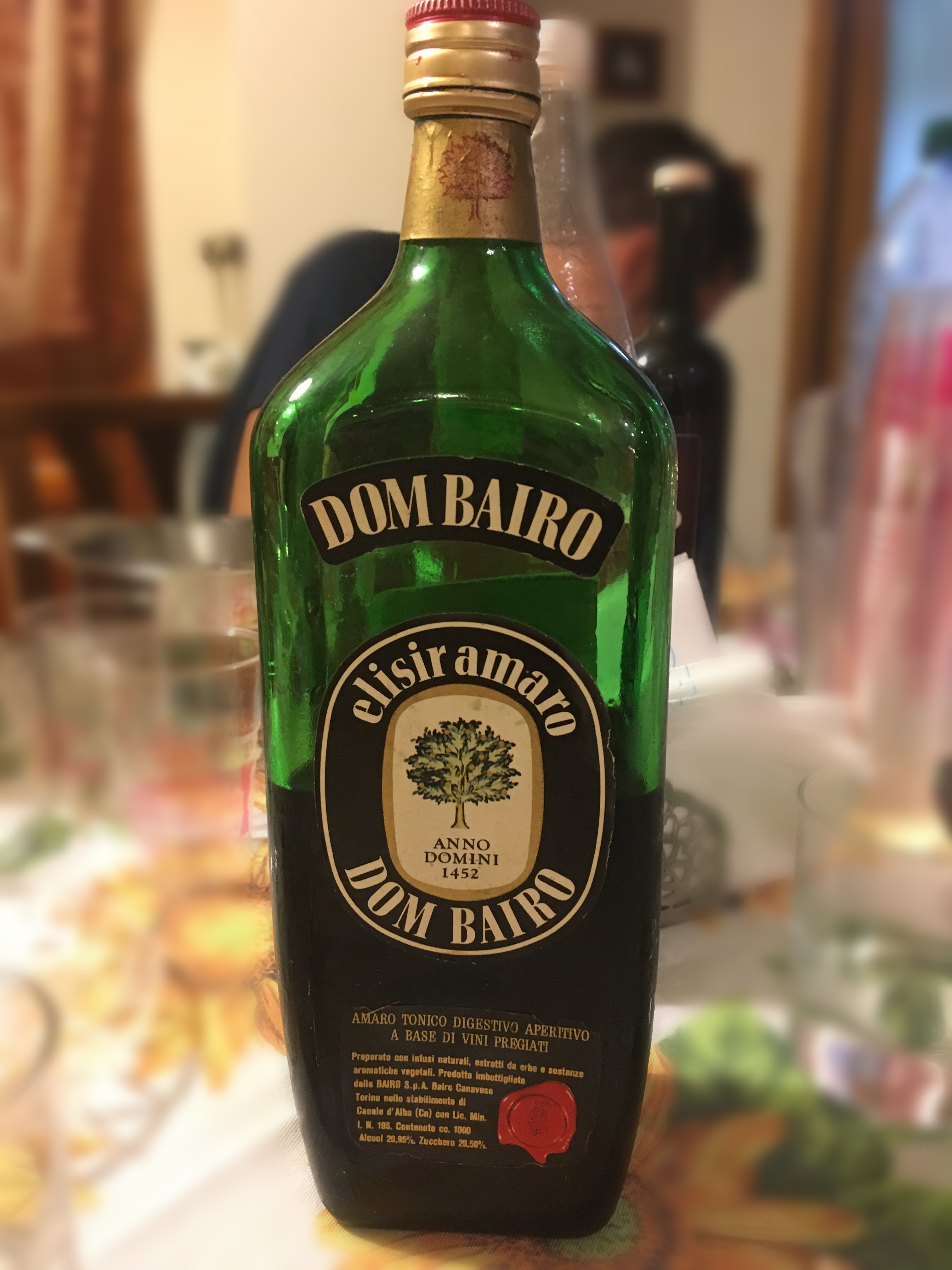 Amaro Dom Bairo